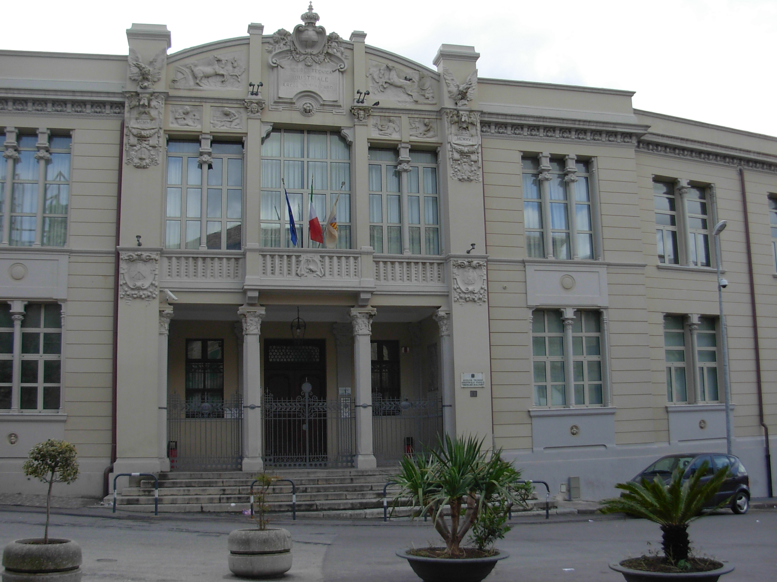 Istituto Industriale Scalfaro